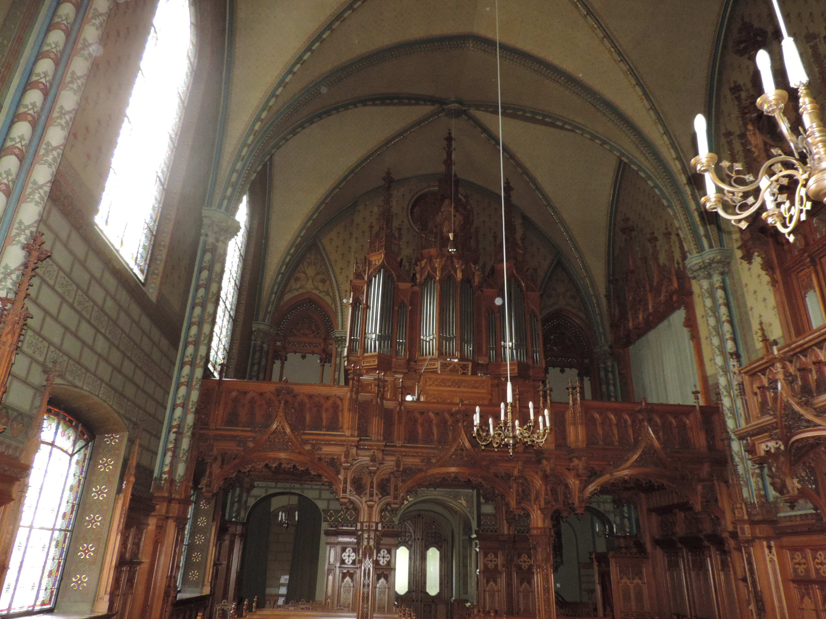 Blick auf die Steinmeyer-Orgel in St. Johannes Göggingen